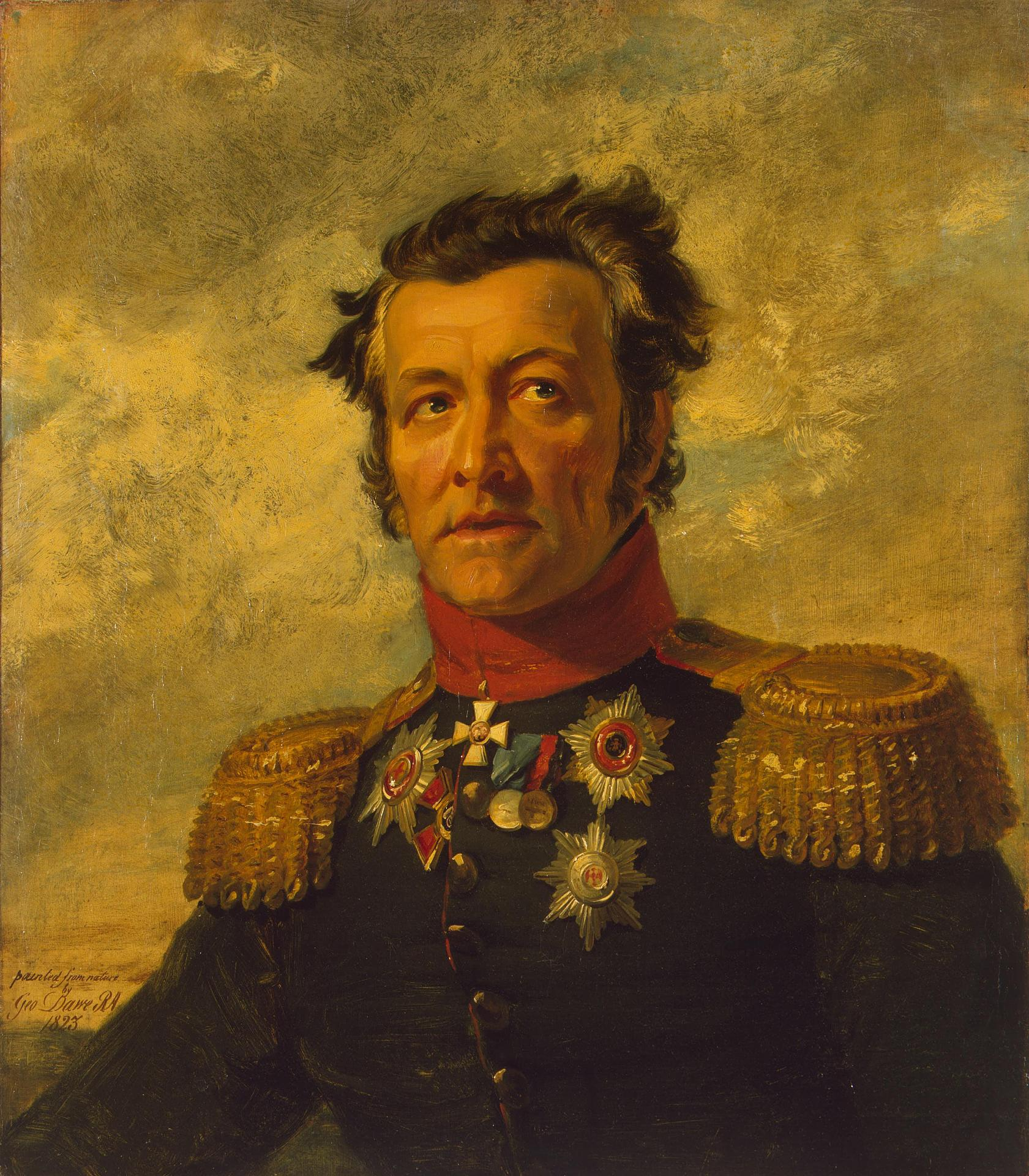 Григо́рий Макси́мович Берг (Gregor von Berg; 1765—1838) — генерал от инфантерии из остзейского рода Бергов. Младший брат генерал-лейтенанта Берг, Бурхард Максимович.